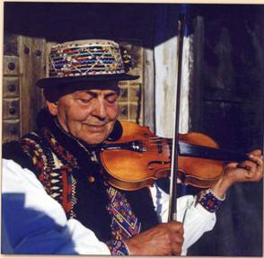 Василь Могур так грав на скрипці, що люди вірили у його потойбічну силу